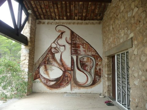 Fresque peinte Rolf sur un mur de sa maison à Joucas